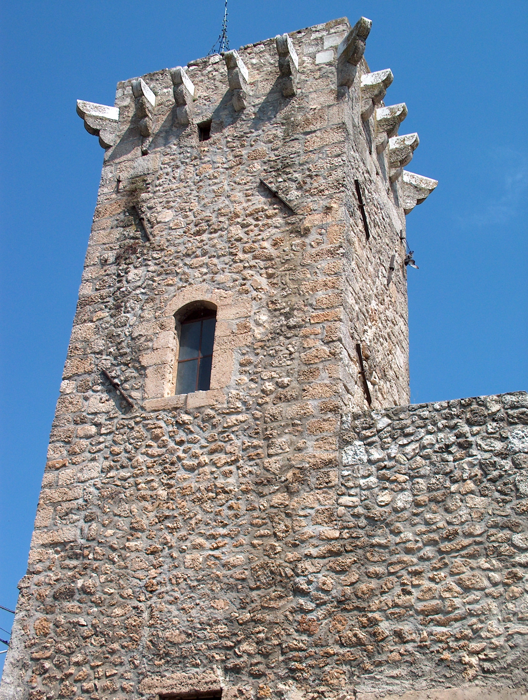 La torre di Civitaretenga prima del sisma del 6 aprile 2009